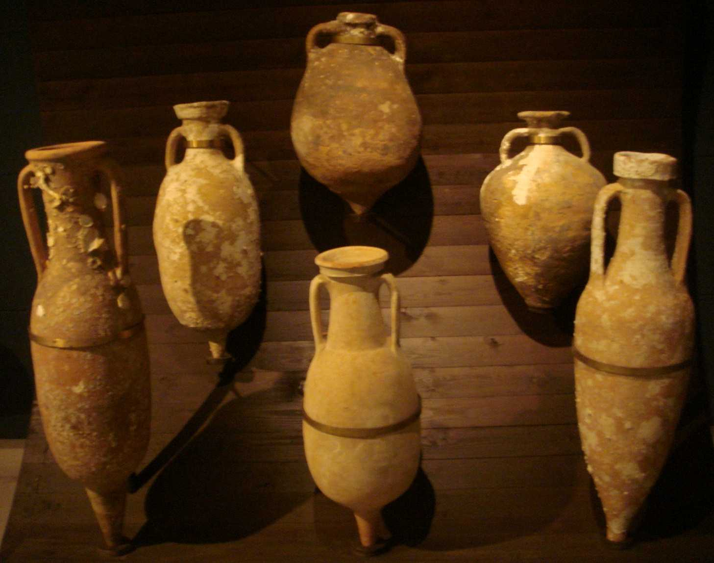 Ánforas de la sala del comercio romano del Museo de Cádiz.